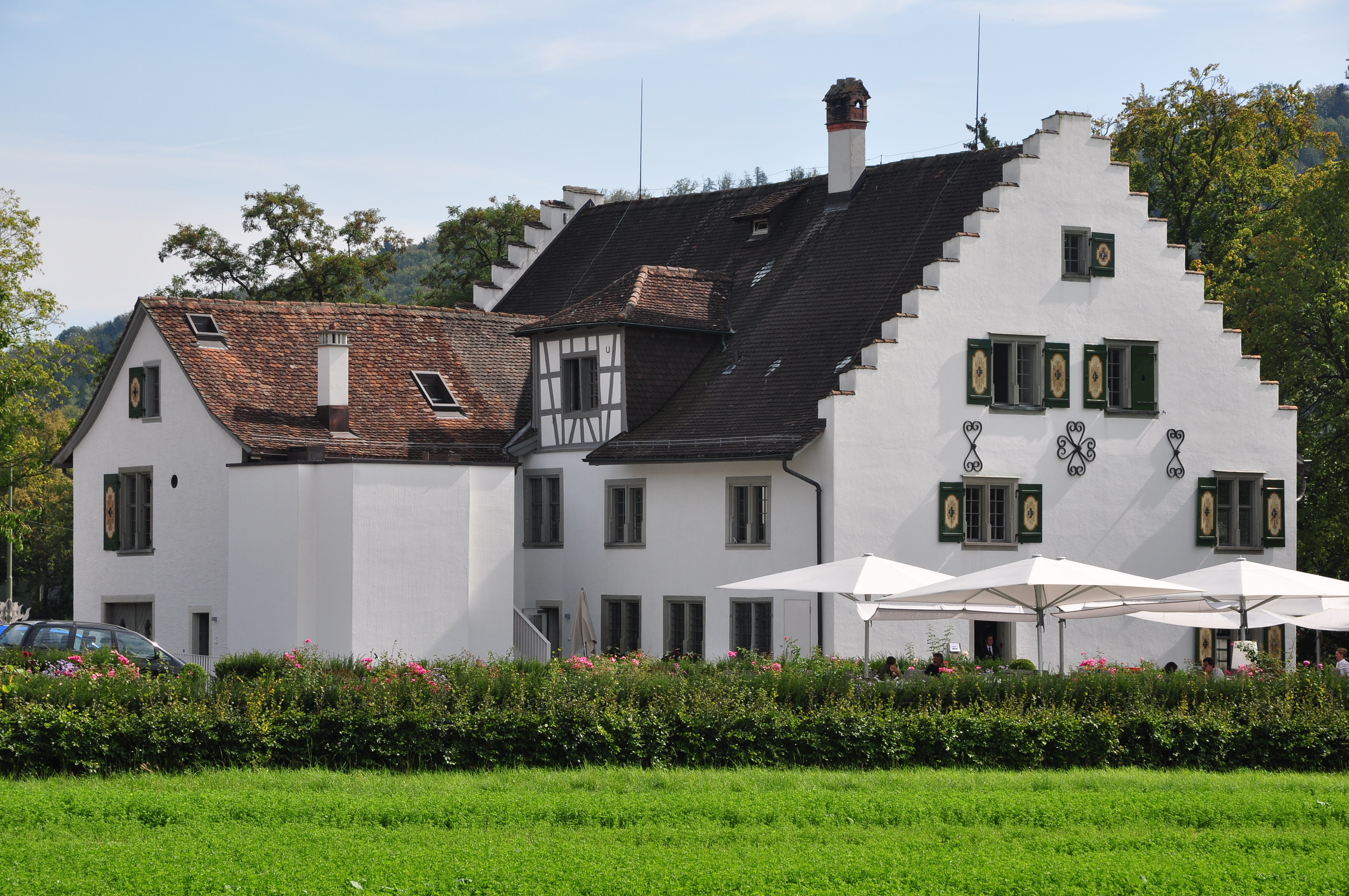 Schloss Wülflingen mit Waschhaus und Scheune, Wülflingerstrasse 214 in Winterthur (Switzerland)